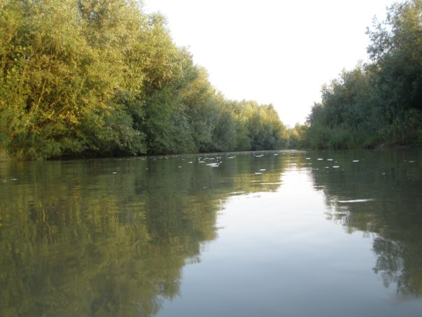 река Јадар, Лозница